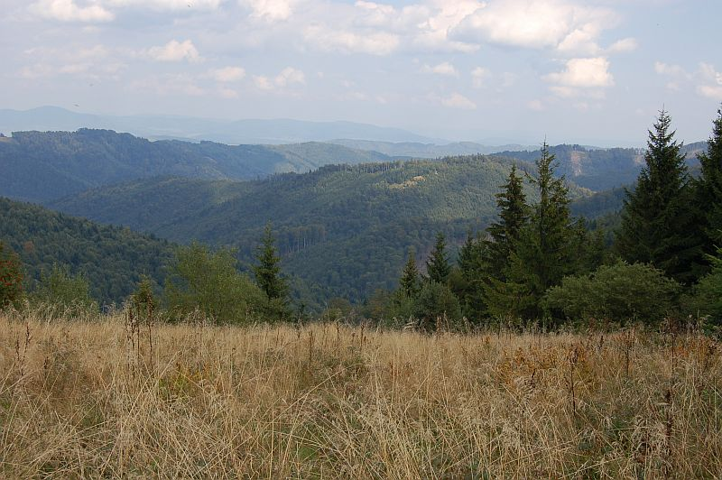 Čergov (Slovakia)